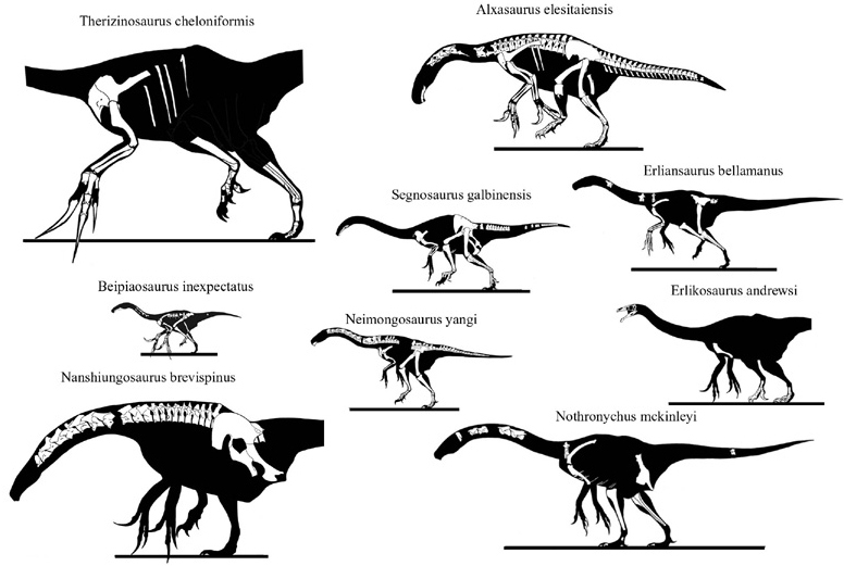 Therizinosaur skeletons to scale.